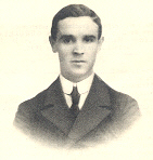 Religioso marianista, (1884-1936), mártir durante la Guerra Civil Española.